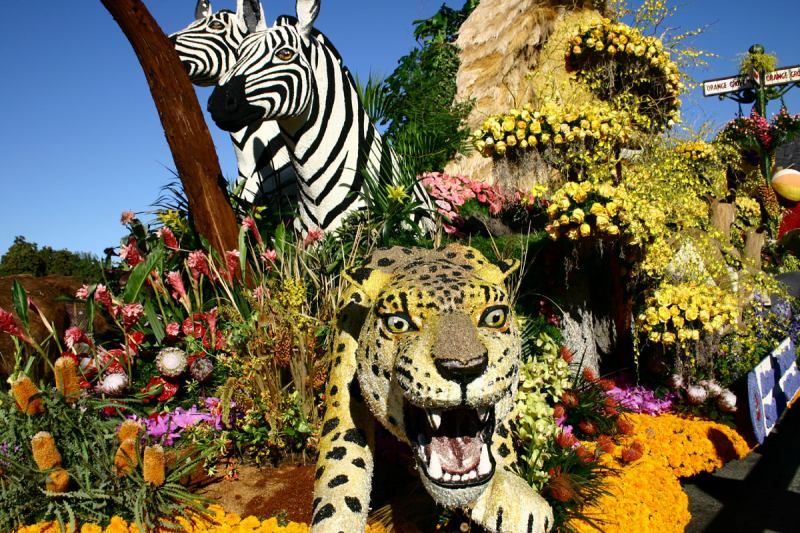 Kelvin Kay, user:kkmd